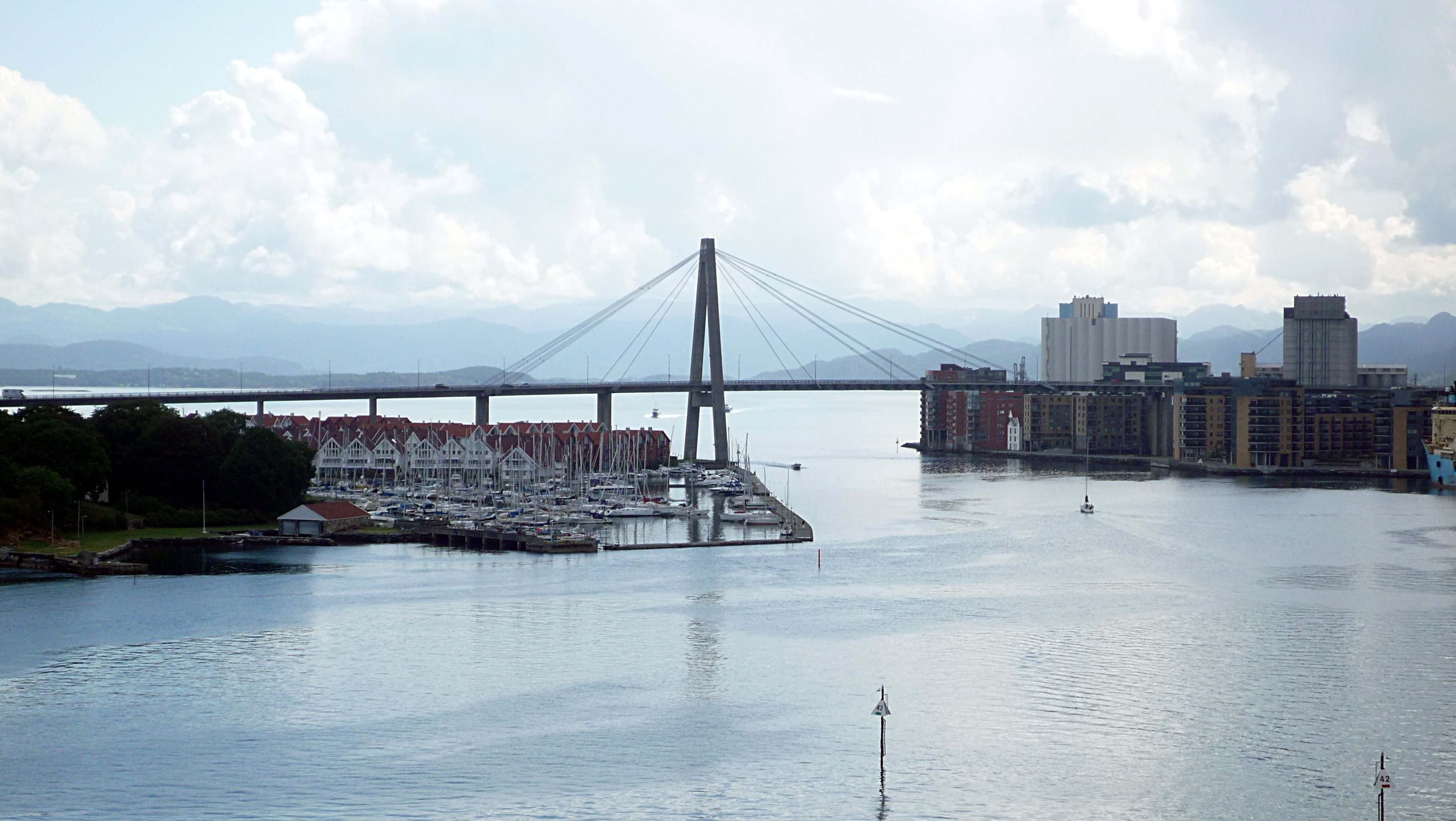 Stavanger bybru